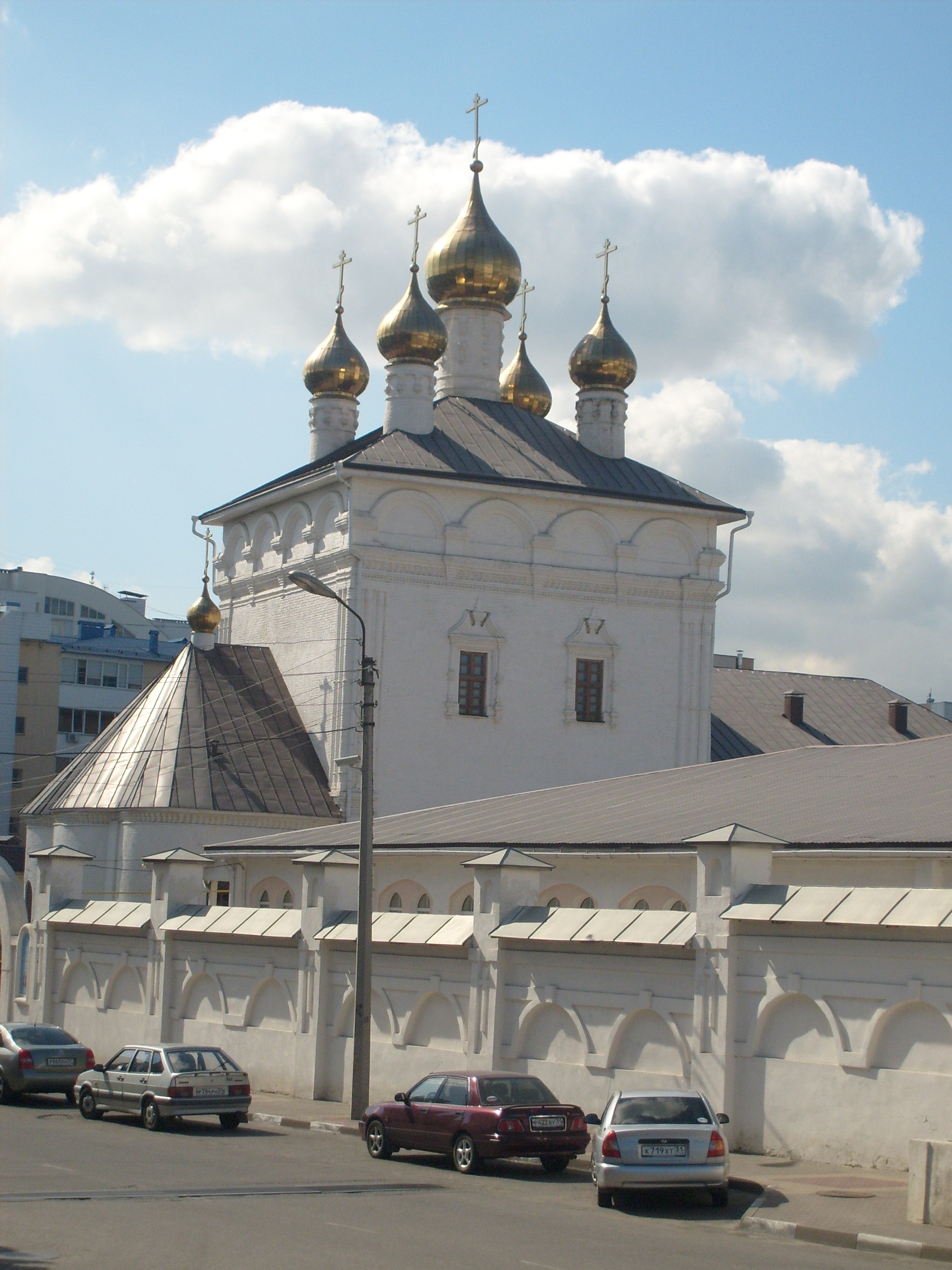 местное название: Успенско-Никольский собор в Марфо-Мариинском монастыре или Успенско-Никольская церковь. Старейшая каменная постройка на современной территории Белгородской области. Кирпичная церковь, сооруженная в 1692-1703 солдатами Белгородского полка. Бесстолпный пятиглавый четверик с трапезной и шатровой колокольней, с декором в духе московского зодчества рубежа XVII-XVIII вв. В южной апсиде Никольский престол, в трапезной Предтеченский придел (1751). Венчание перестроено после пожара 1759. Закрыт в нач. 1930-х, венчания сломаны, занят хлебозаводом. Возвращен верующим в 1998, к середине 2000-х отреставрирован.